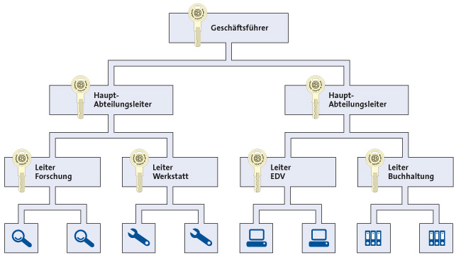 Beispiel für eine GHS-Anlage